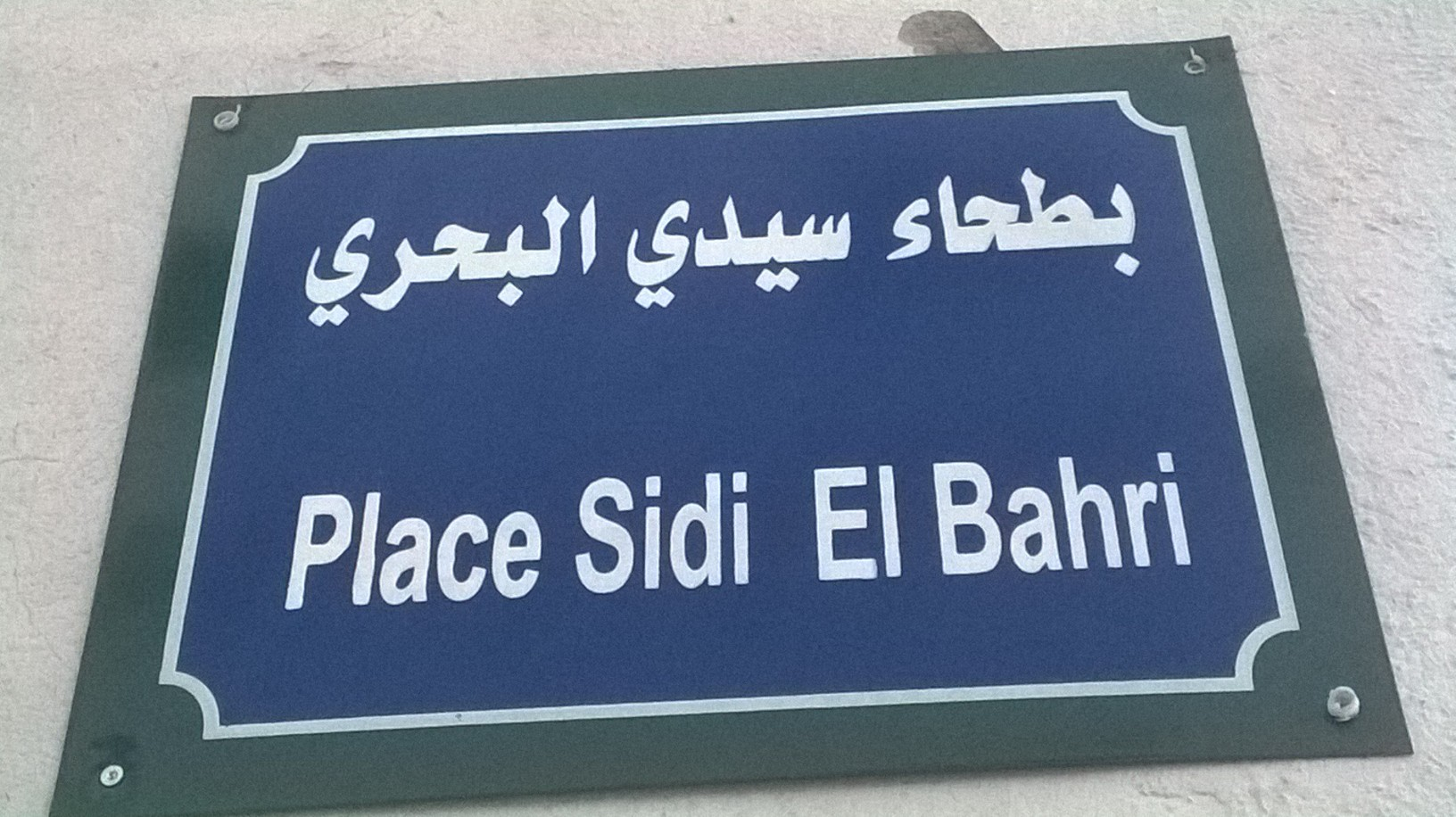 Place Sidi El Bahri, Tunis بطحاء سيدي البحري , تونس